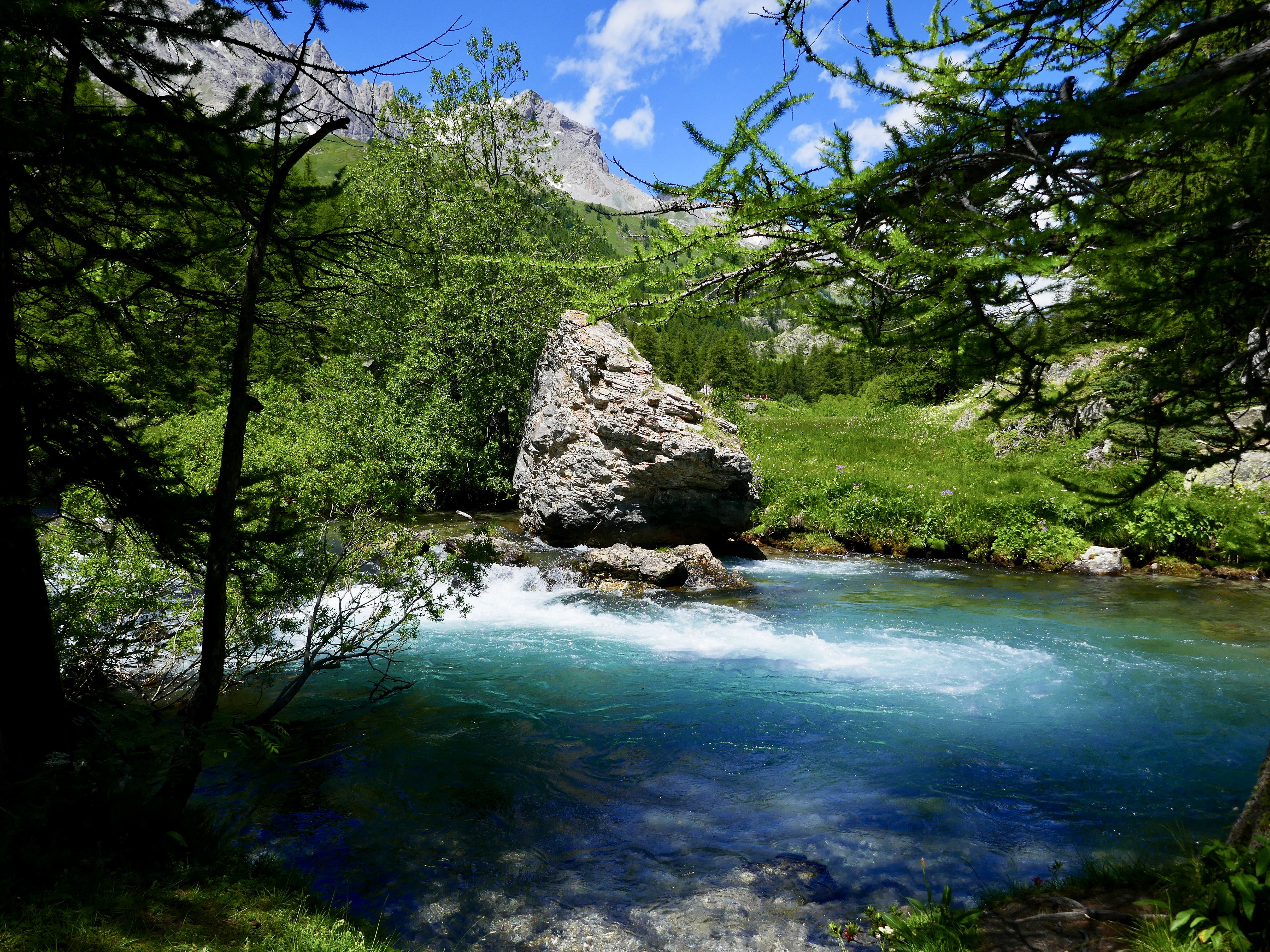 Haute vallée de la Clarée au hameau de Sainte-Marie (commune de Névache) 28 juin 2020